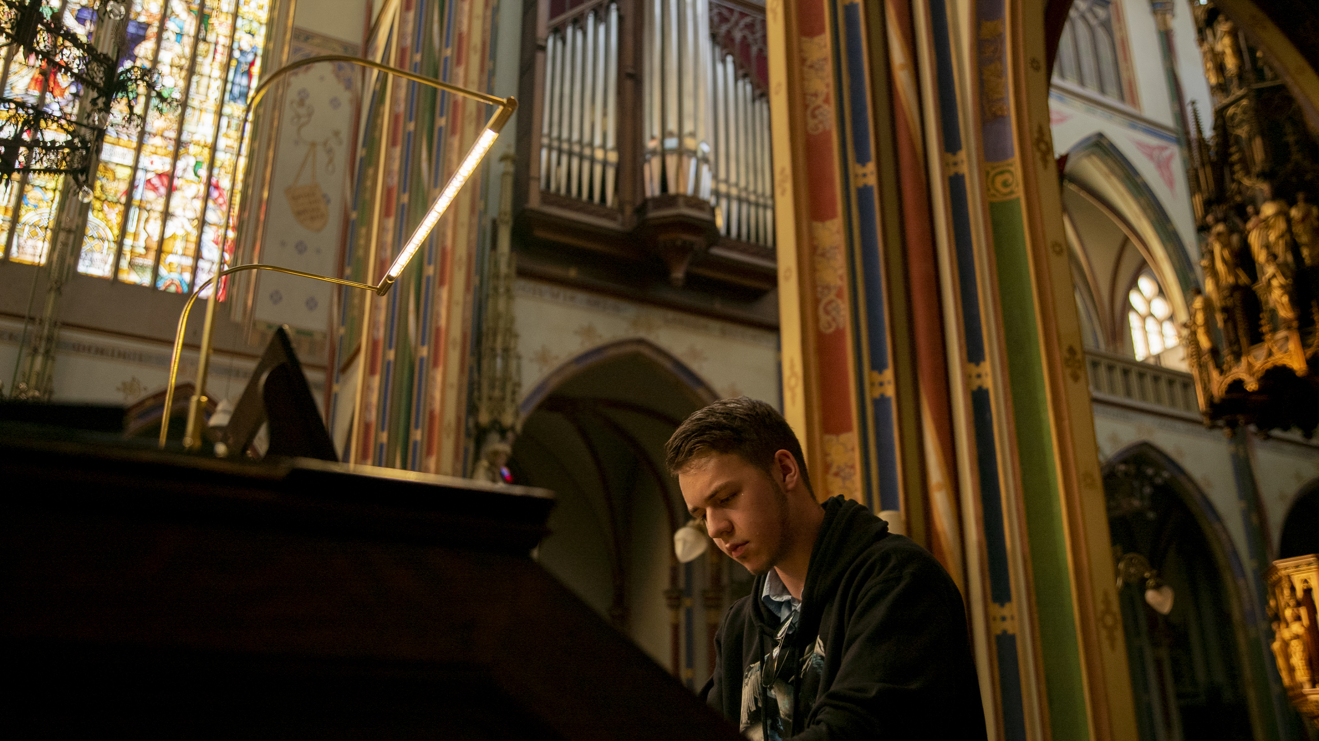 Sefa op het orgel in de Krijgtbergkerk.